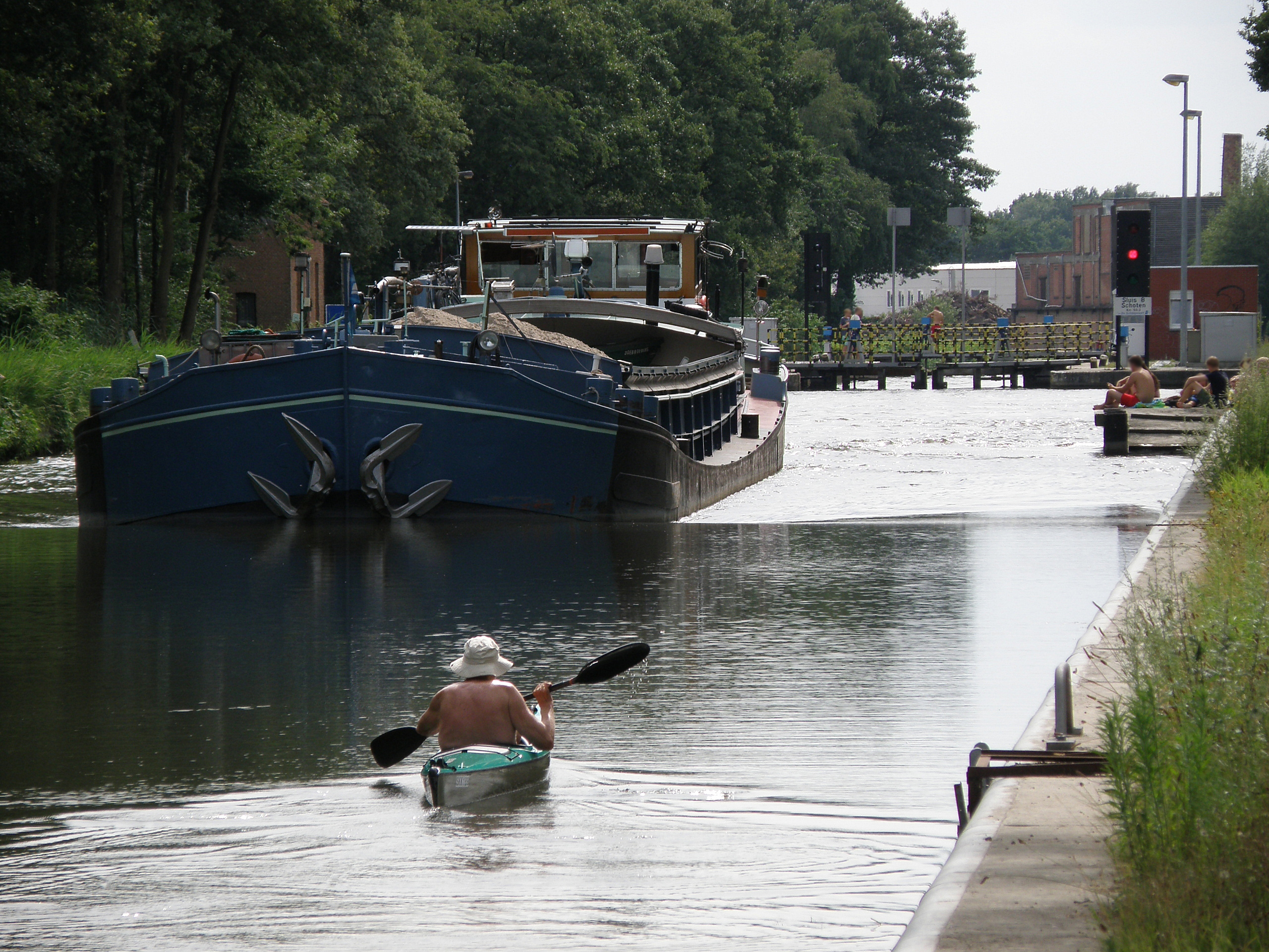 Kanaal Dessel-Turnhout-Schoten, nabij sluis 8 te Schoten.